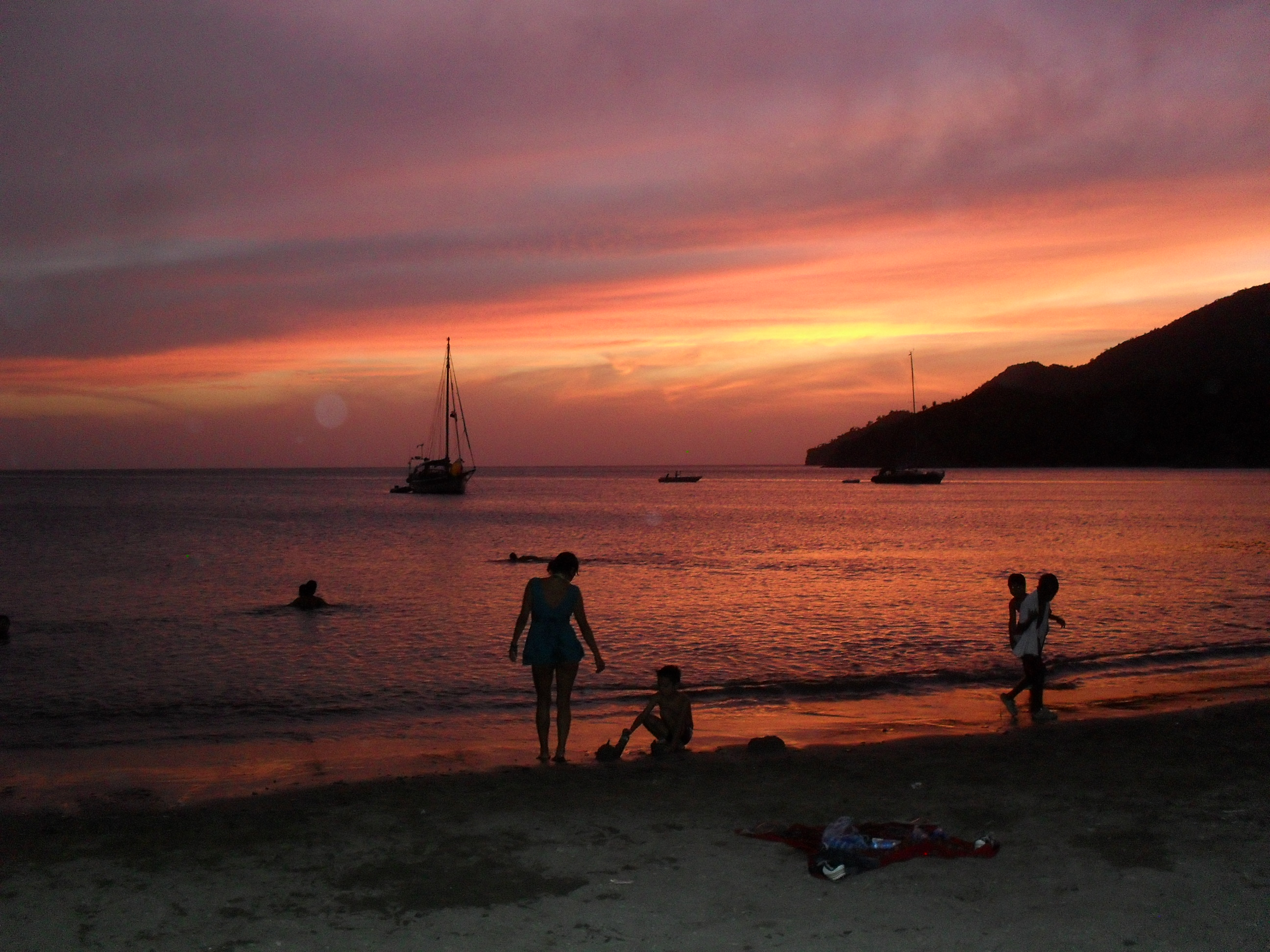 Atardecer en Taganga, Santa Marta, Colombia